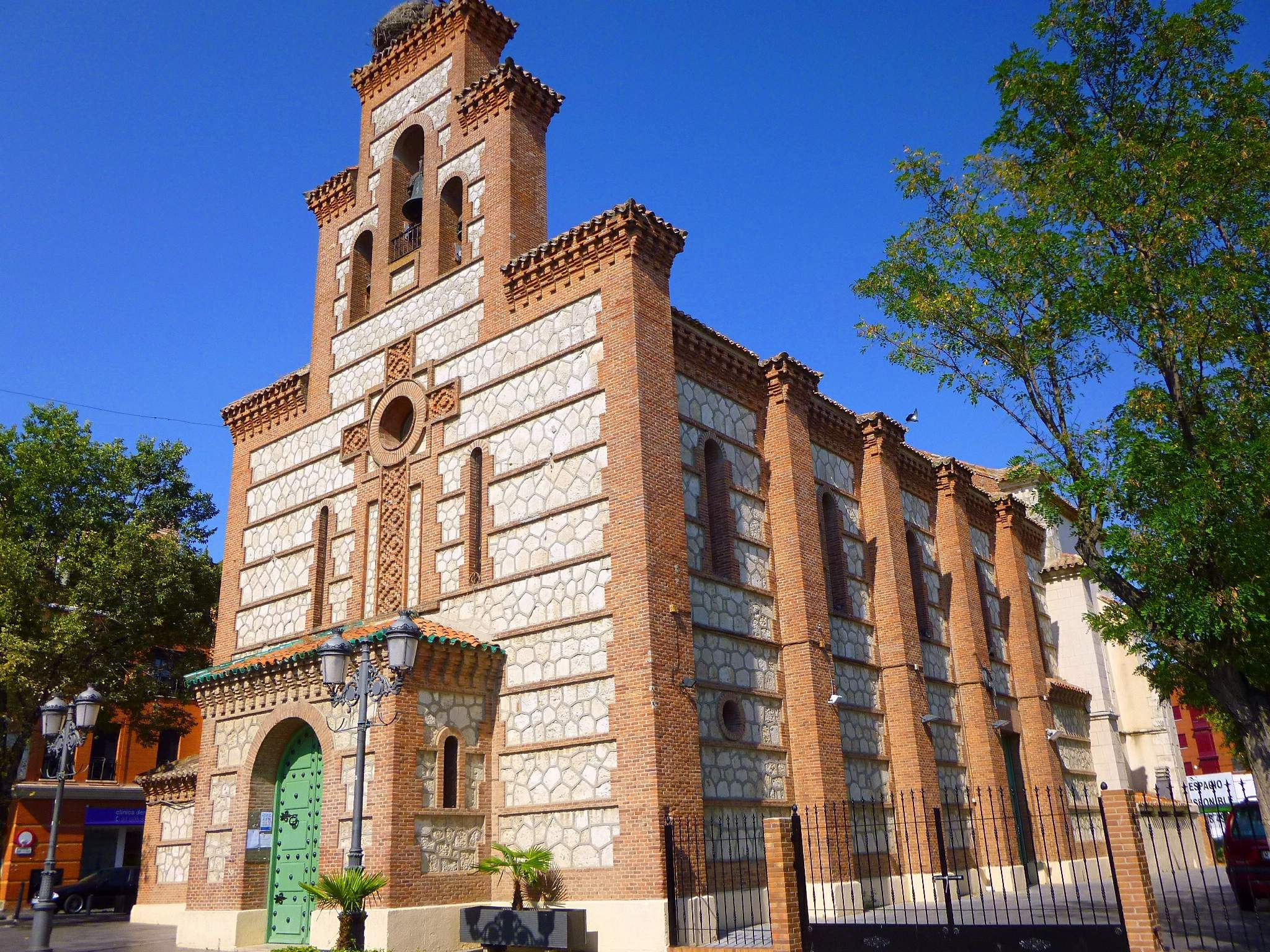 Iglesia de Nuestra Señora de la Asunción (Parla)